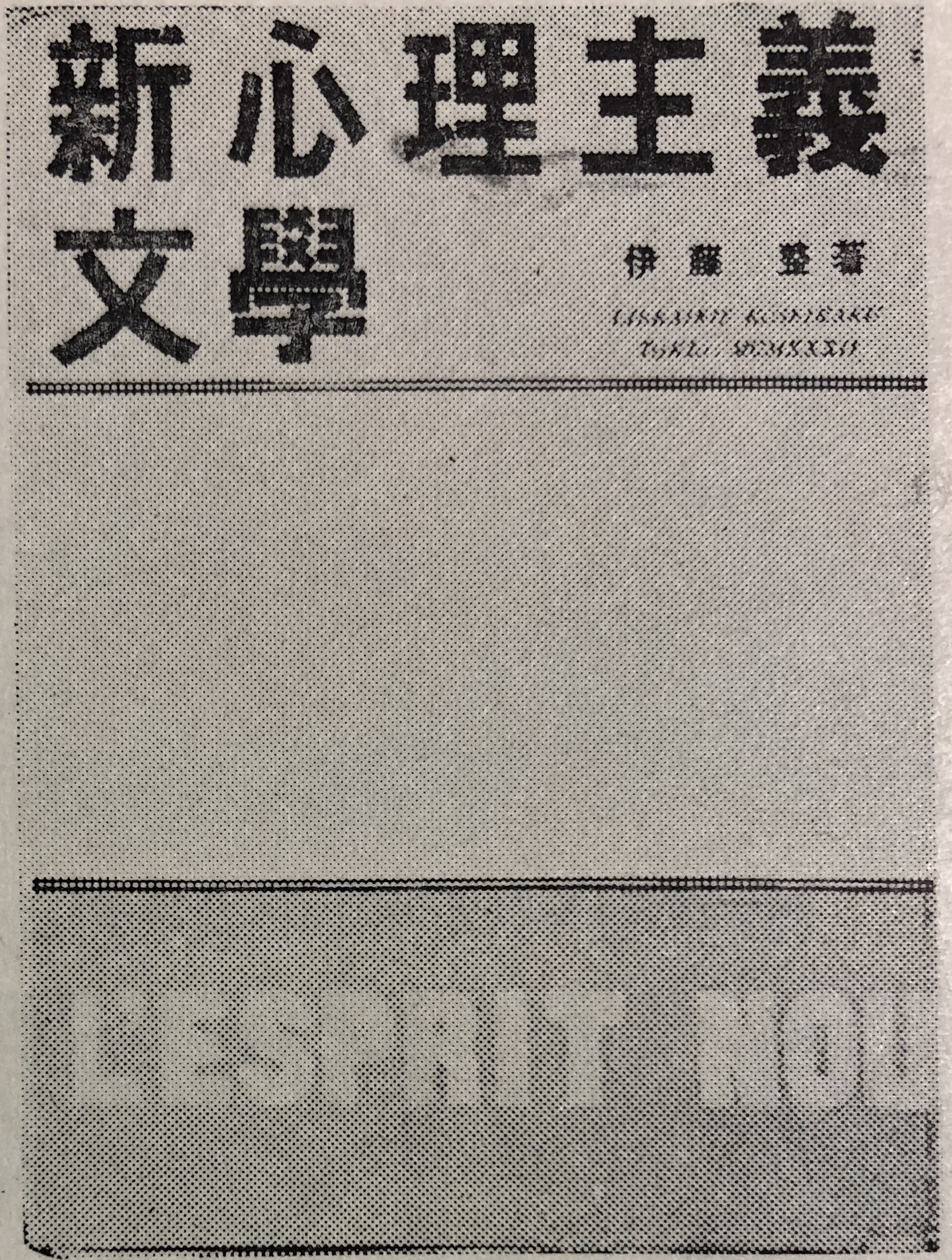 伊藤整「新心理主義文学」表紙（厚生閣 1932年） 「日本の文学59 伊藤整」中央公論社 1965年より